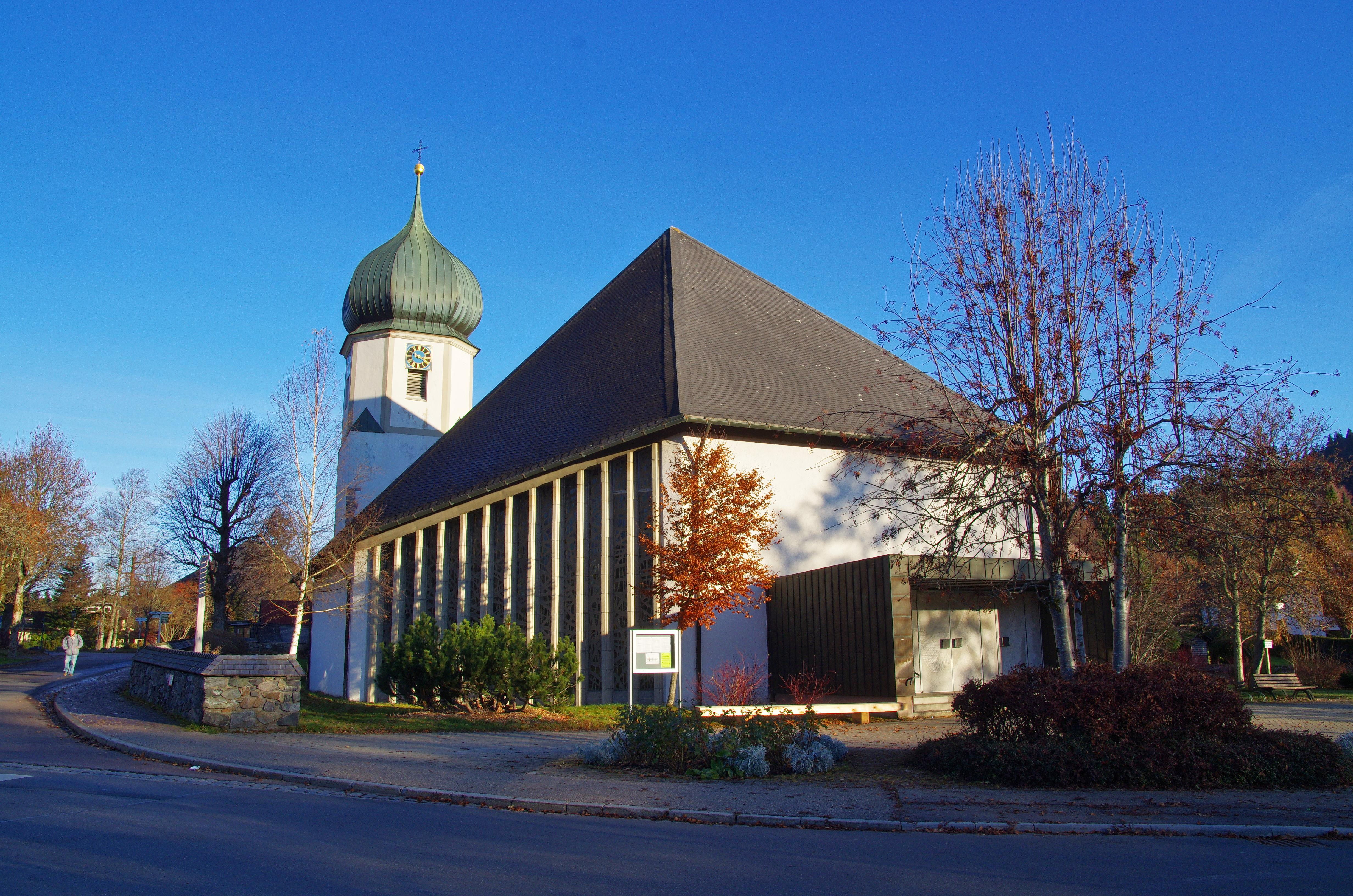 Blick auf die Pfarrkirche Maria in der Zarten in Hinterzarten